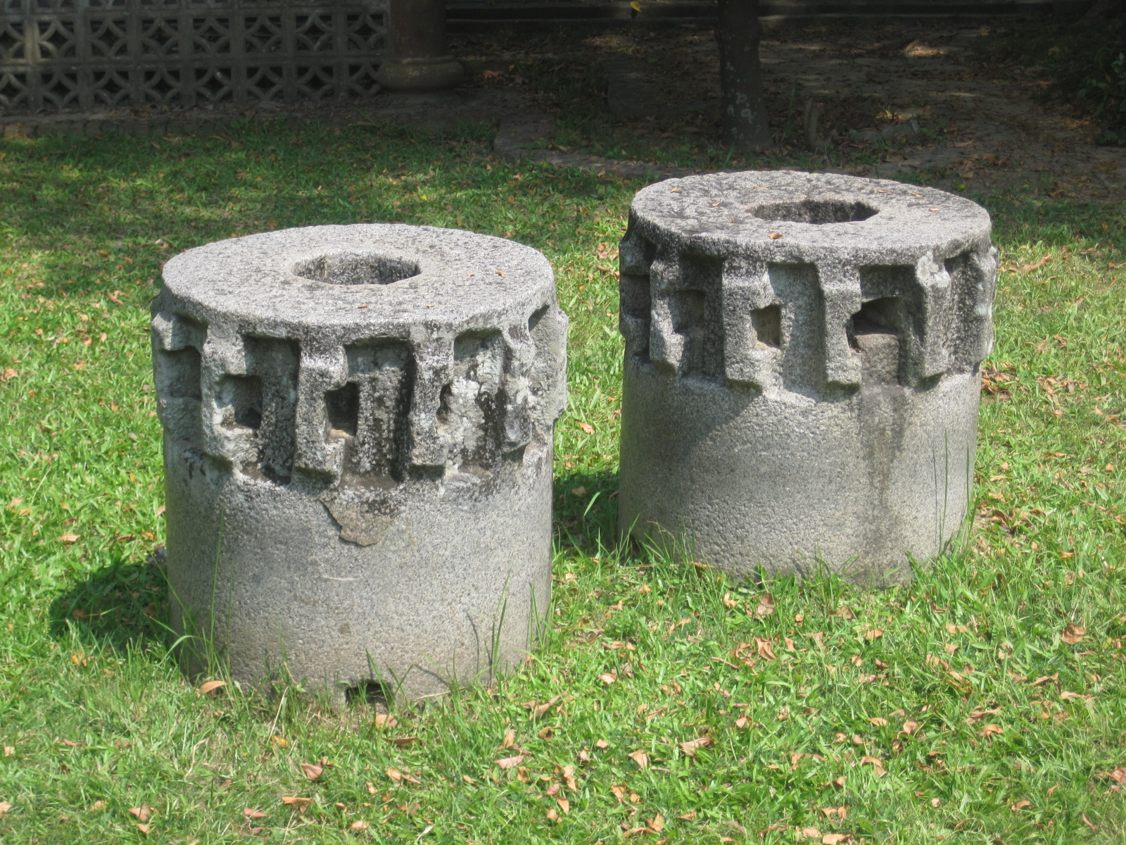 臺南善化糖廠展示的蔗車，為壓榨甘蔗以製糖的工具